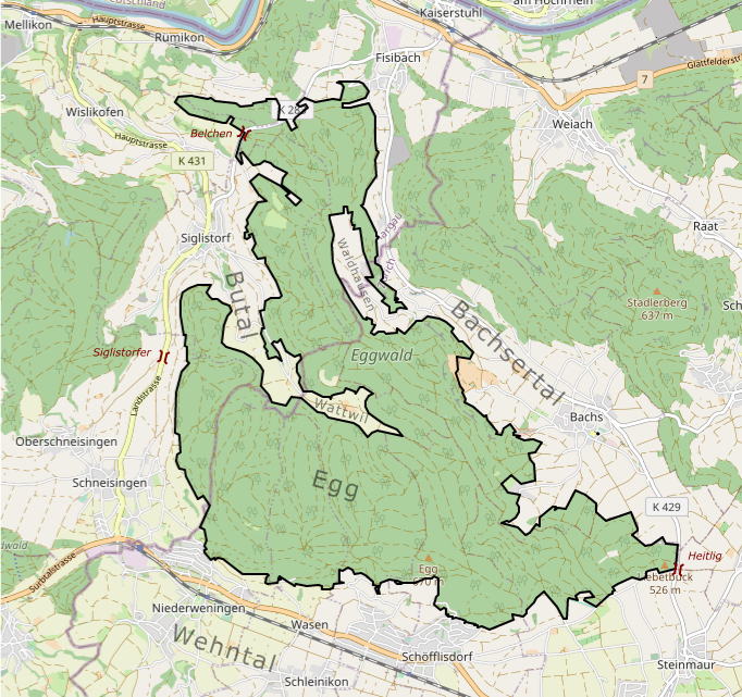 Karte des Eggwaldes zwischen Wehntal und Bachsertal